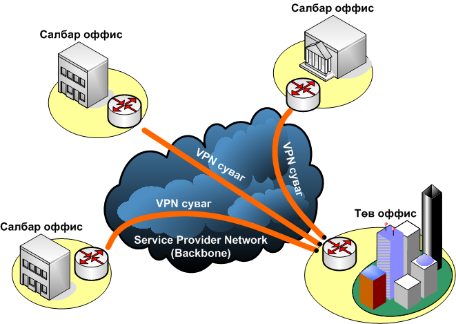 Монгол: Site-to-Site VPN